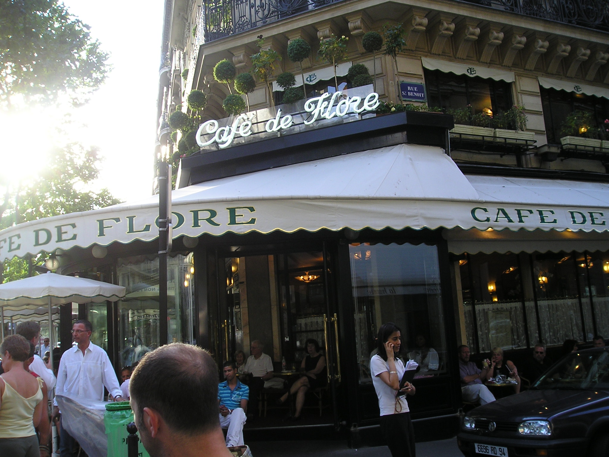 Café de Flore, VIe arrondissement, Paris (France)